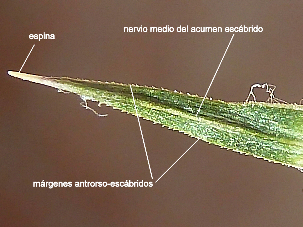 Carduus pycnocephalus - (Cardo, cardo borriquero, cardo negro) - Acumen de una bráctea involucral media con los márgenes y el nervio medio escabridos.. - Descampado circa Biblioteca, Albatera (Provincia de Alicante, Espàña).